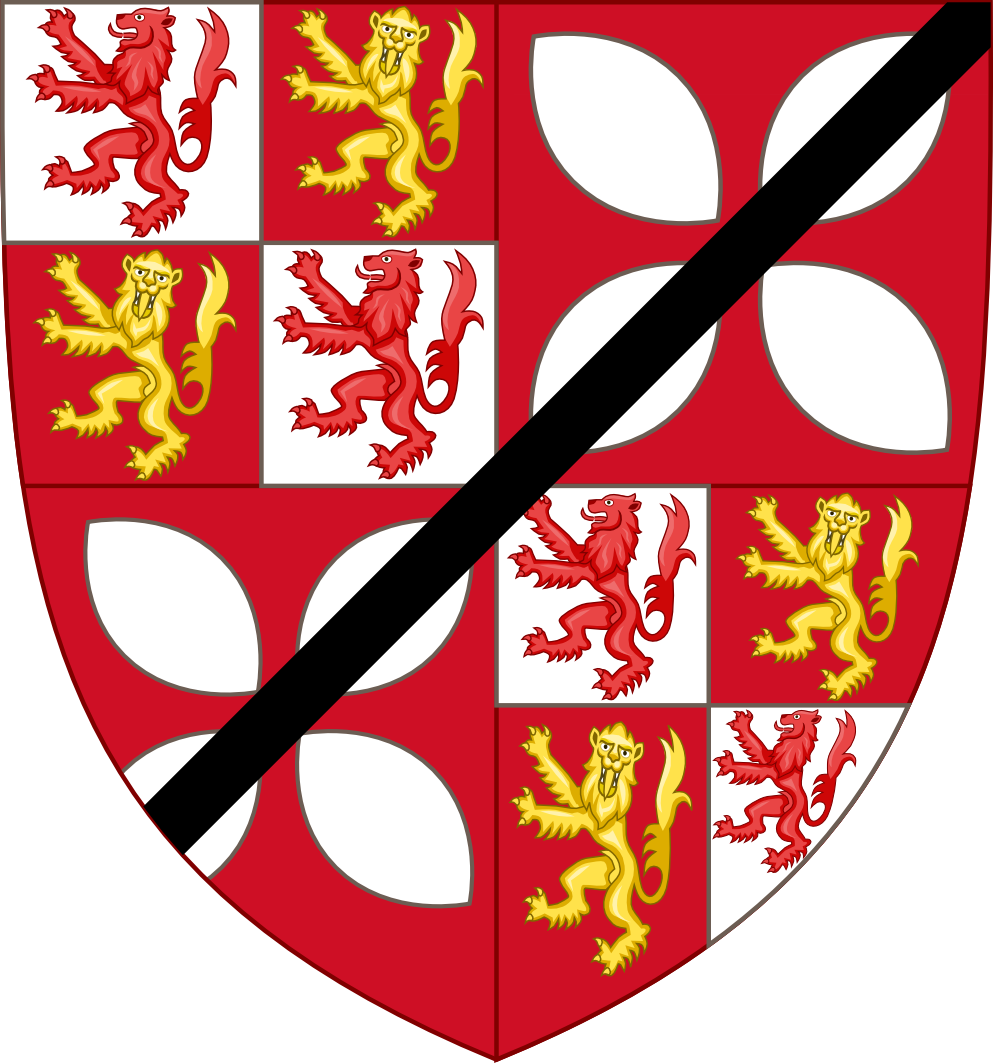 Armes de Jean de Lescun, comte de comminges